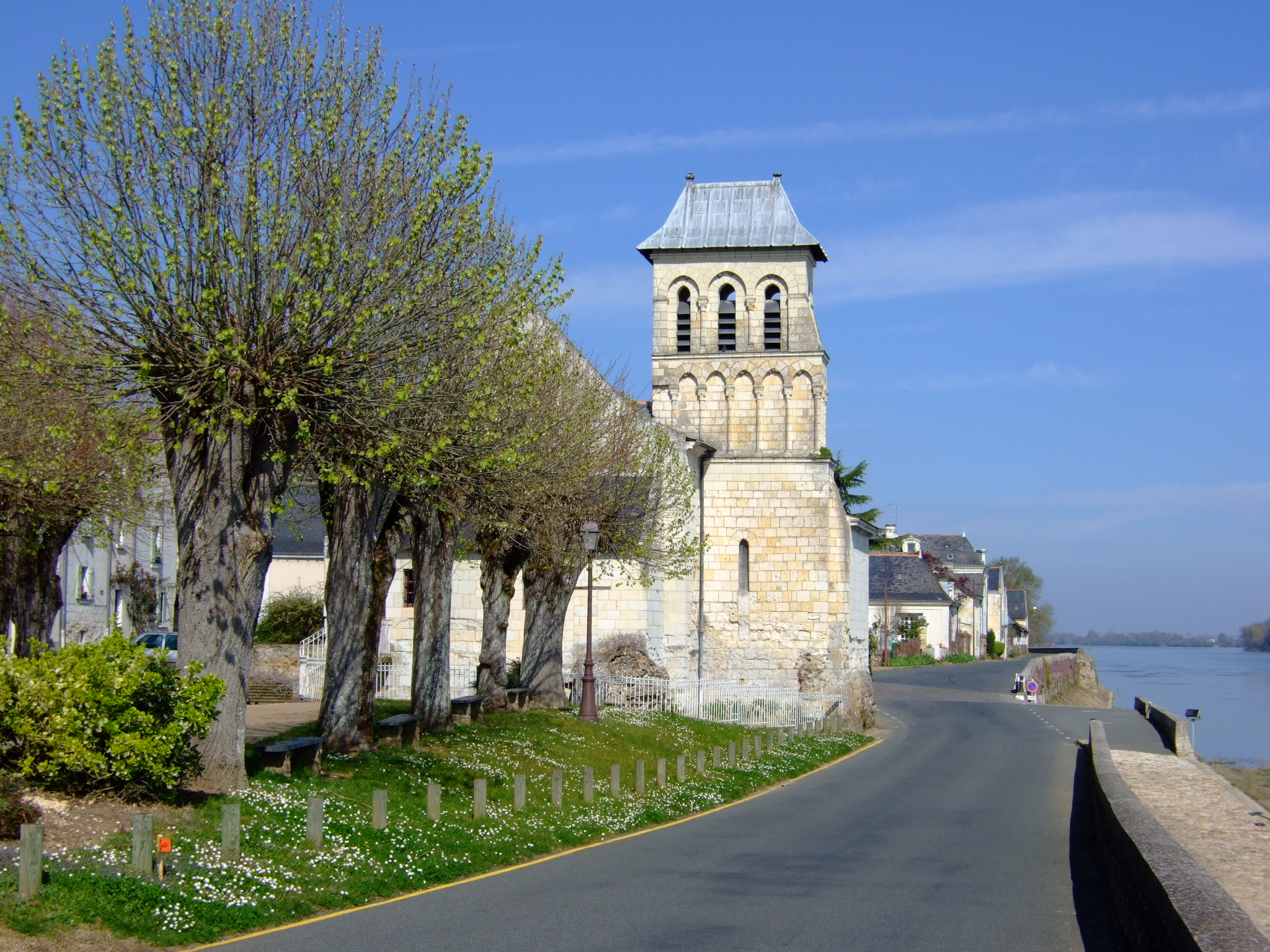 Le village du Thoureil